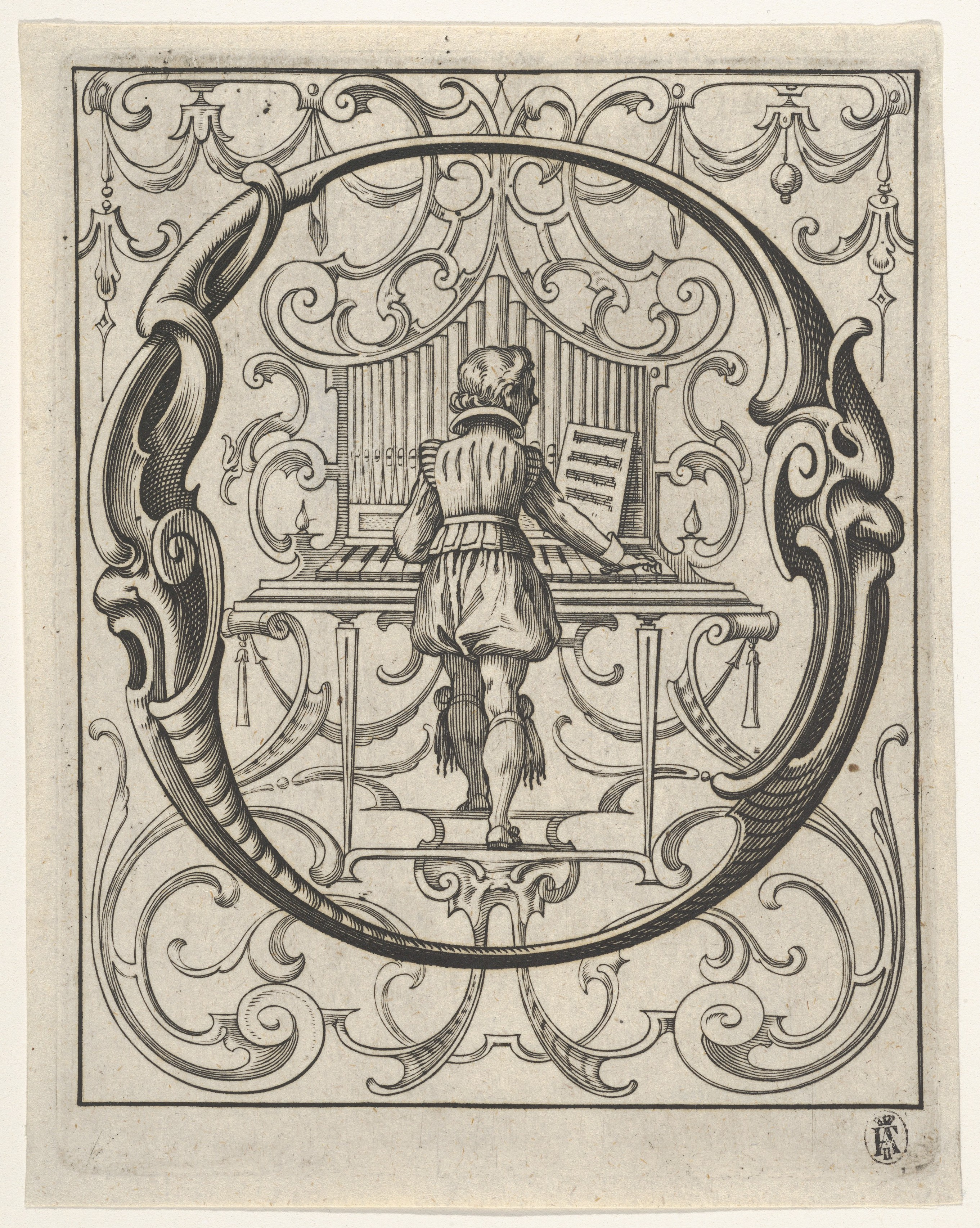 Book; Books